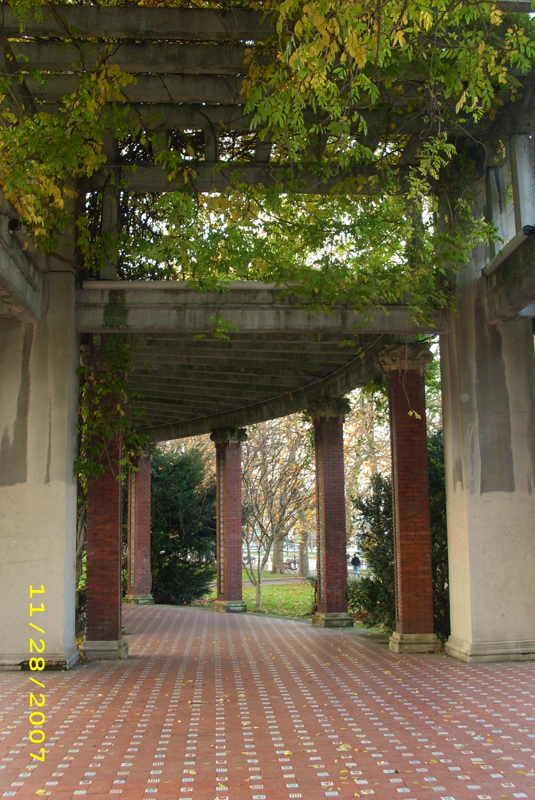 Pérgola del Parque de Doña Casilda.